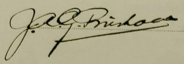 Подпись Йопа Бисхара